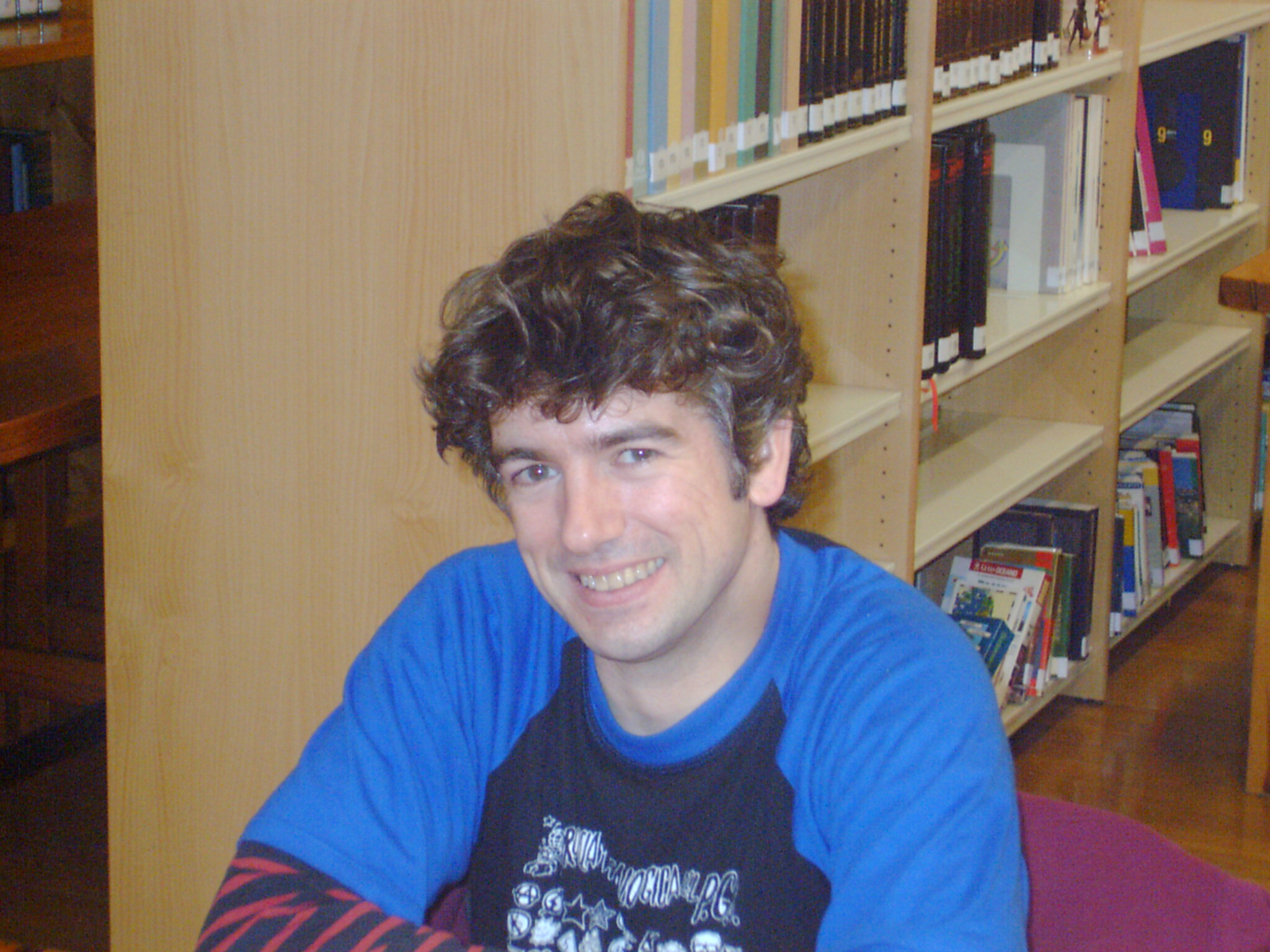 Asel Luzarraga